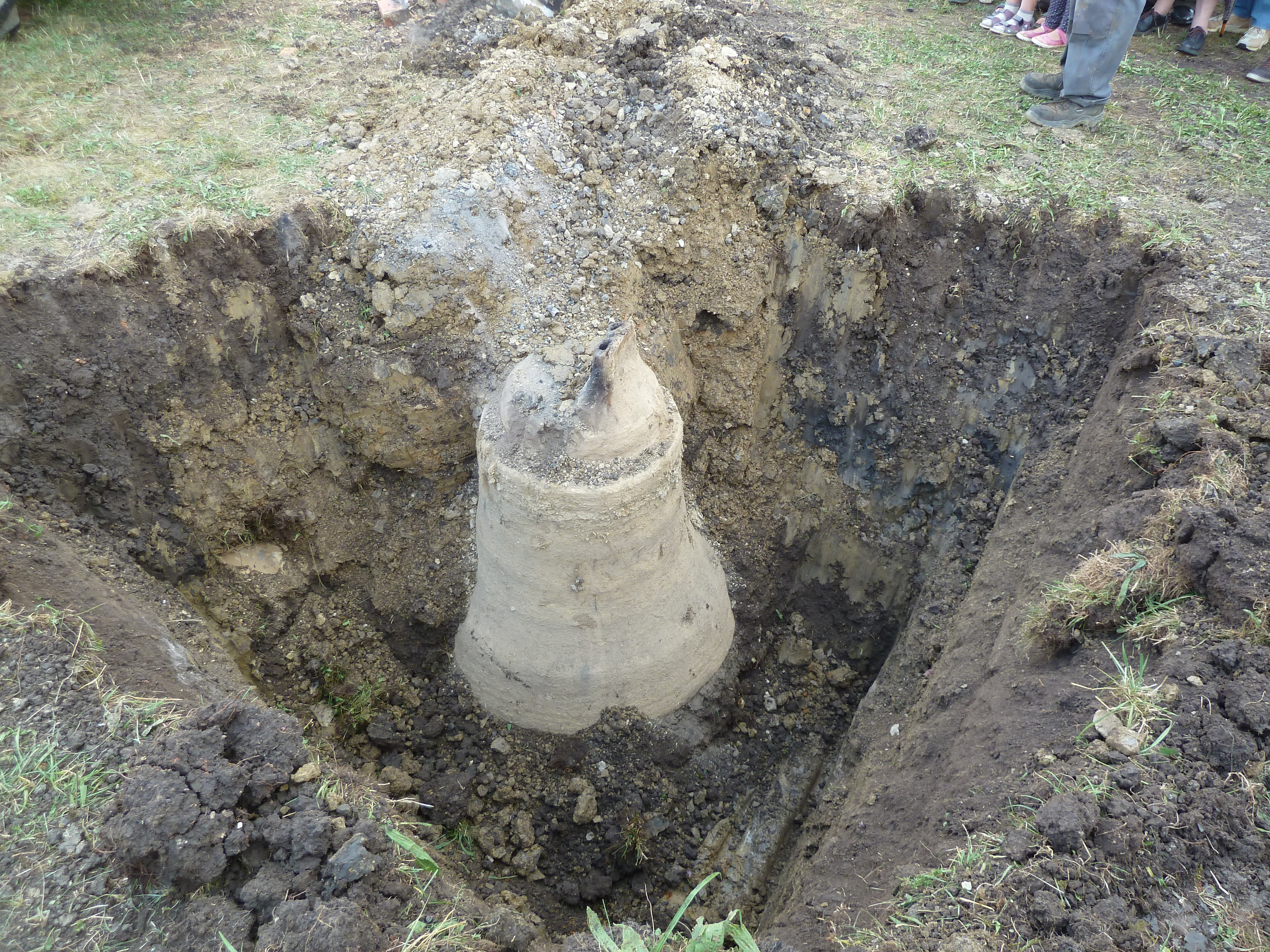 Glockenguss in Ewattingen mit Bruder Michael Reuter von der Abtei Maria Laach